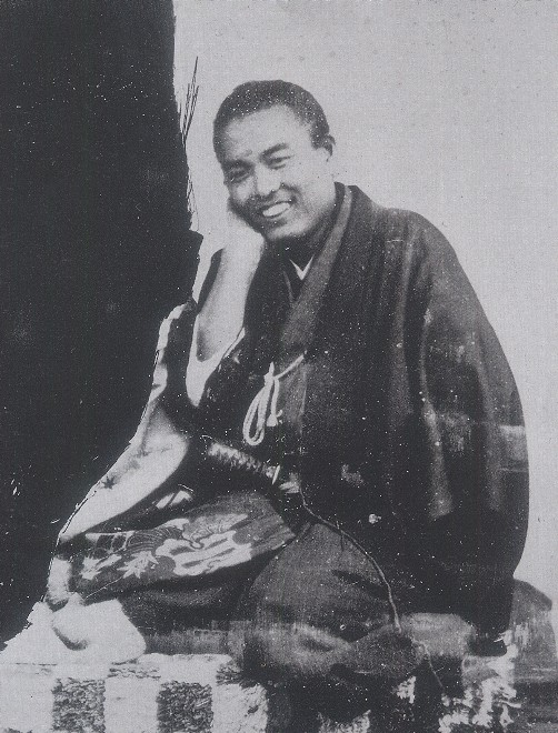 中岡慎太郎 Nakaoka Shintaro.京都寺町仏光寺にあった西洋伝法写真処にて撮影されたもの。頬を支えているのは女性の腕であり、この写真は女性の部分がカットされている。